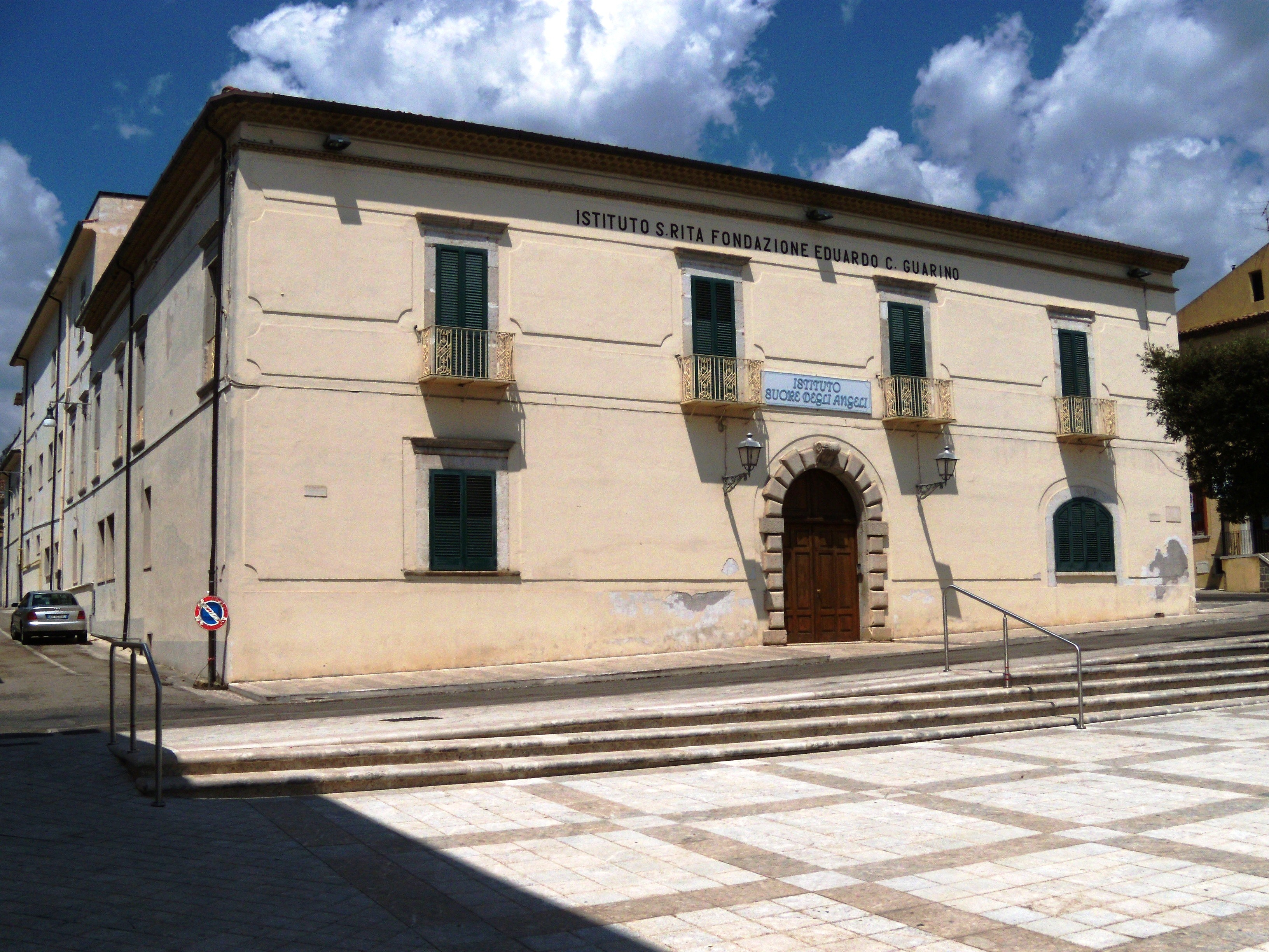 L'Istituto Santa Rita - Fondazione Edoardo Guarino, già orfanotrofio femminile delle Suore degli angeli e sede della sottoprefettura. Cerreto Sannita (Italia).